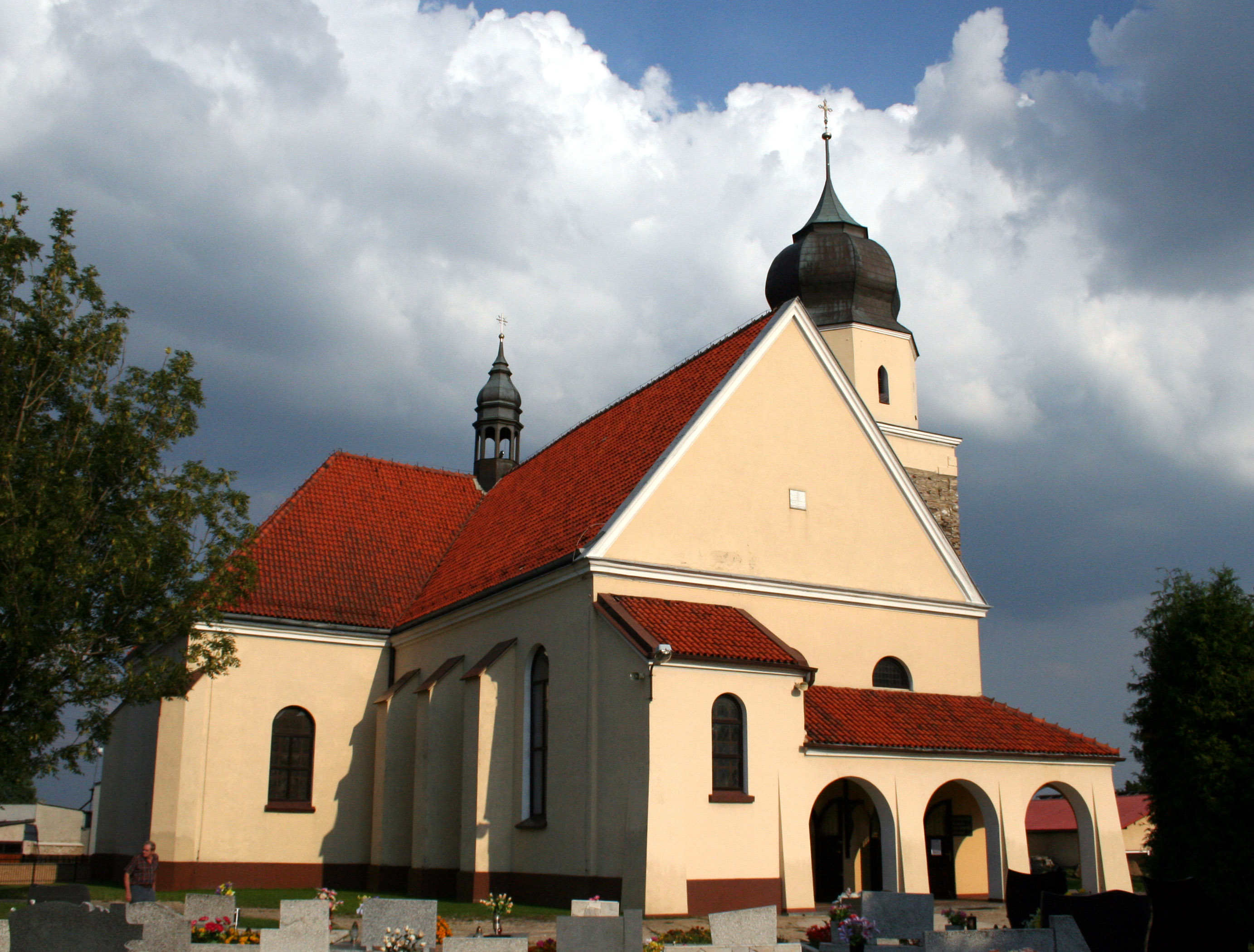 Kościół św. Jakuba Starszego Apostoła w Lubszy, gmina Woźniki, powiat lubliniecki